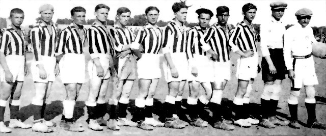 Κατά πολλούς η πρώτη ομάδα του Παναιγιάλειου το 1927.